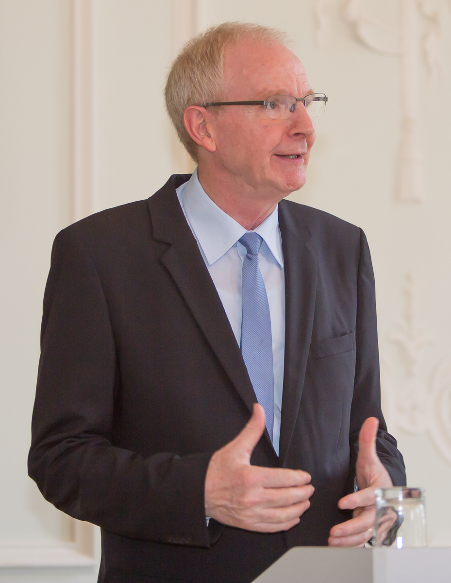 Porträt von Theo Kobusch – bei einer Laudatio für Wolfgang Kubin während einer Feierstunde der Uni Bonn zur Würdigung der Verleihung des Johann-Heinrich-Voß-Preises für Übersetzung an Kubin im „Stucksaal“ des Poppelsdorfer Schlosses